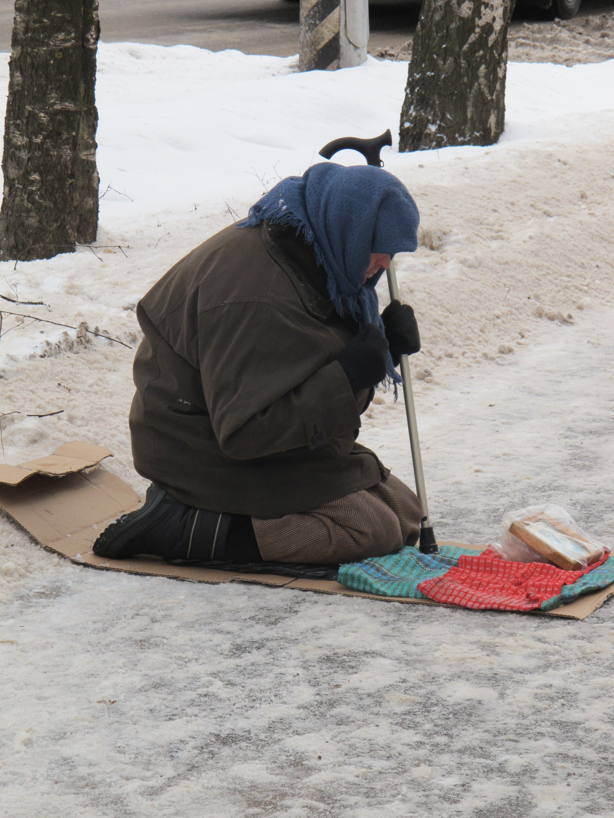 Нищенка на Октябрьской улице в Вологде.